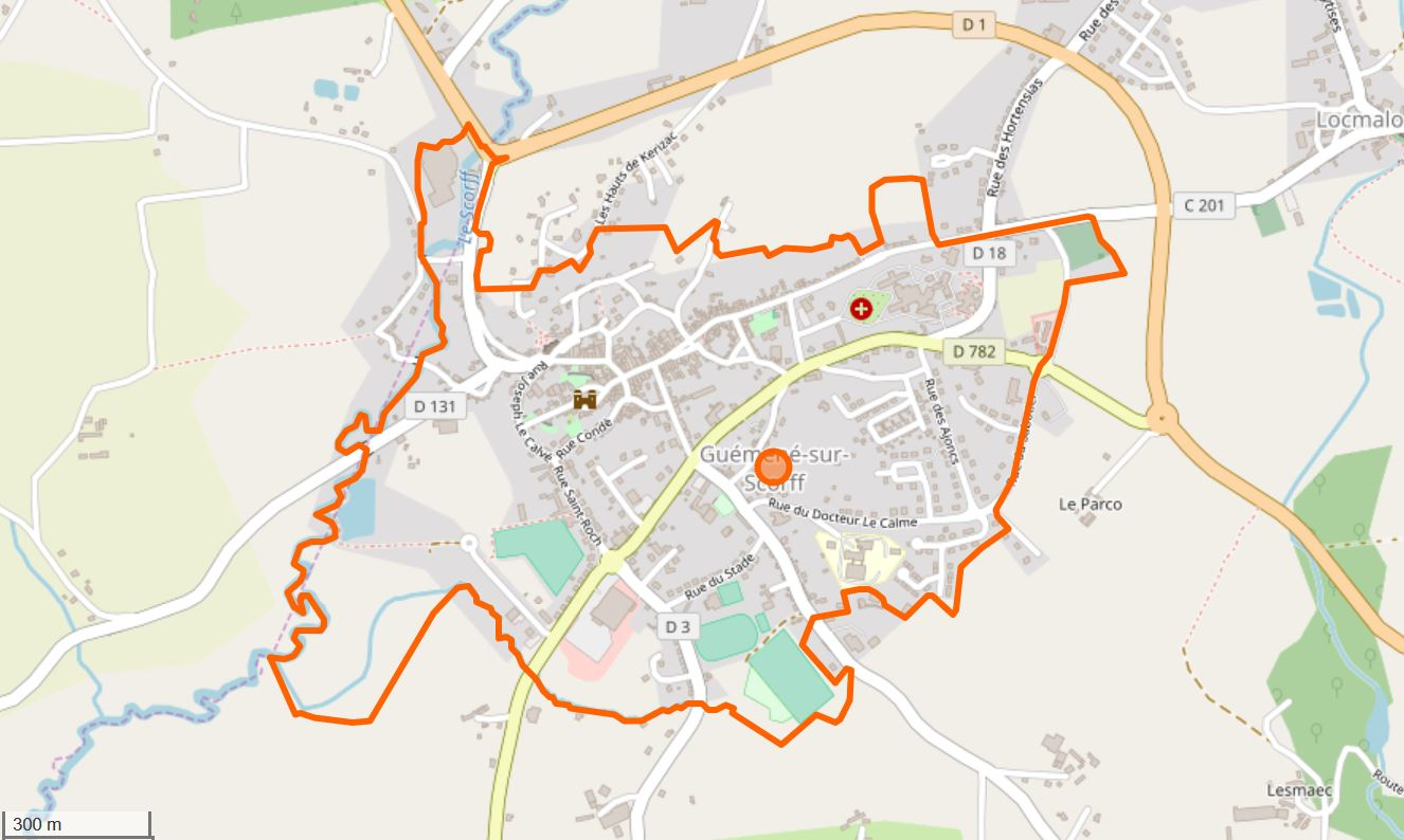 Cette carte a été créée à partir des données du projet Openstreetmap. This map may be incomplete, and may contain errors. Don't rely solely on it for navigation.